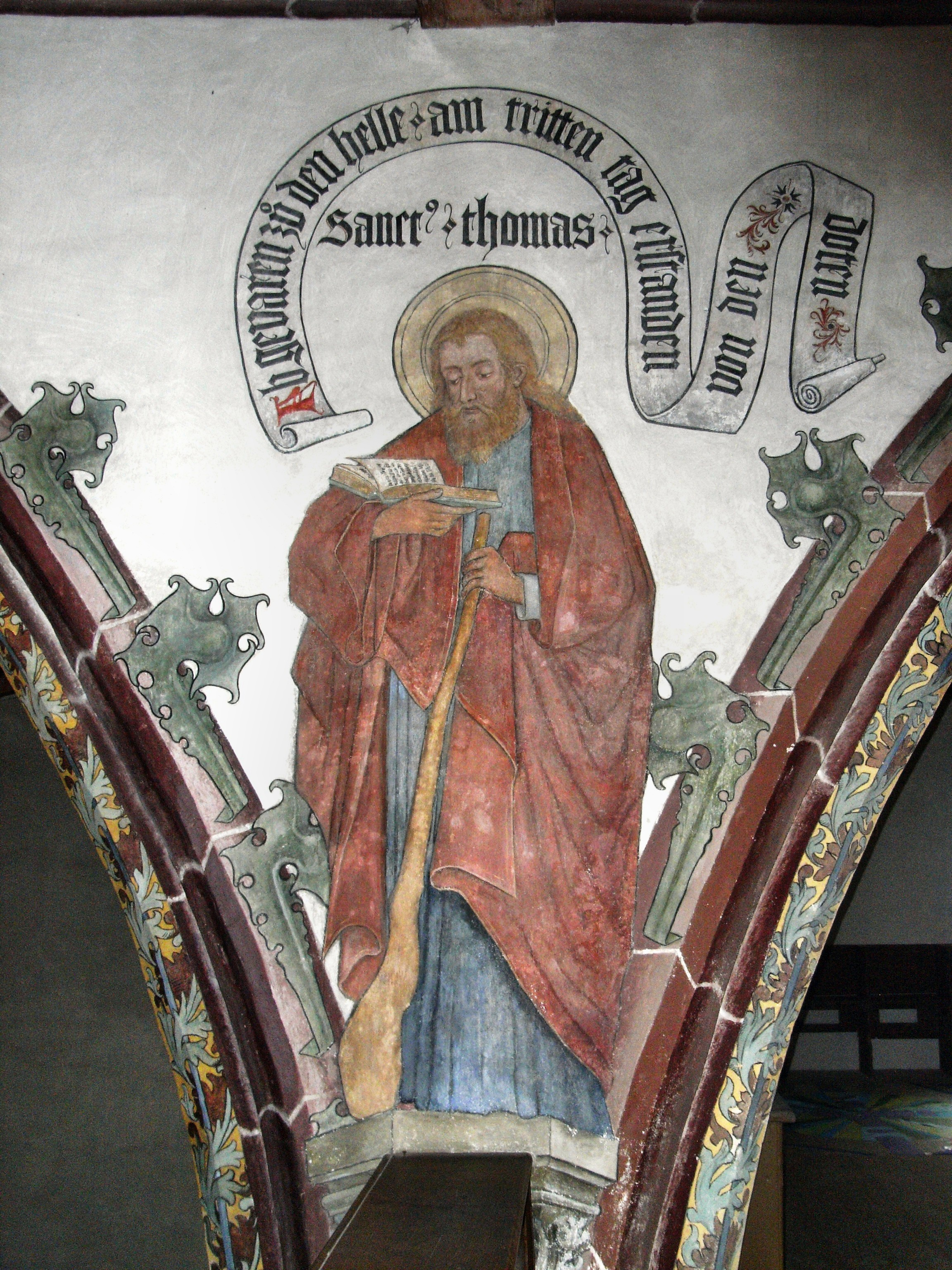 Unser Frauen in Memmingen, Fresko des Jüngers Thomas